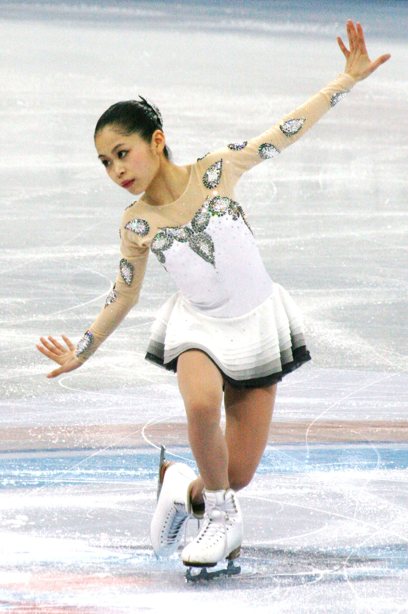 Сатако Мияхара (Япония) на финале Гран-при среди юниоров 2012-2013. Короткая программа.